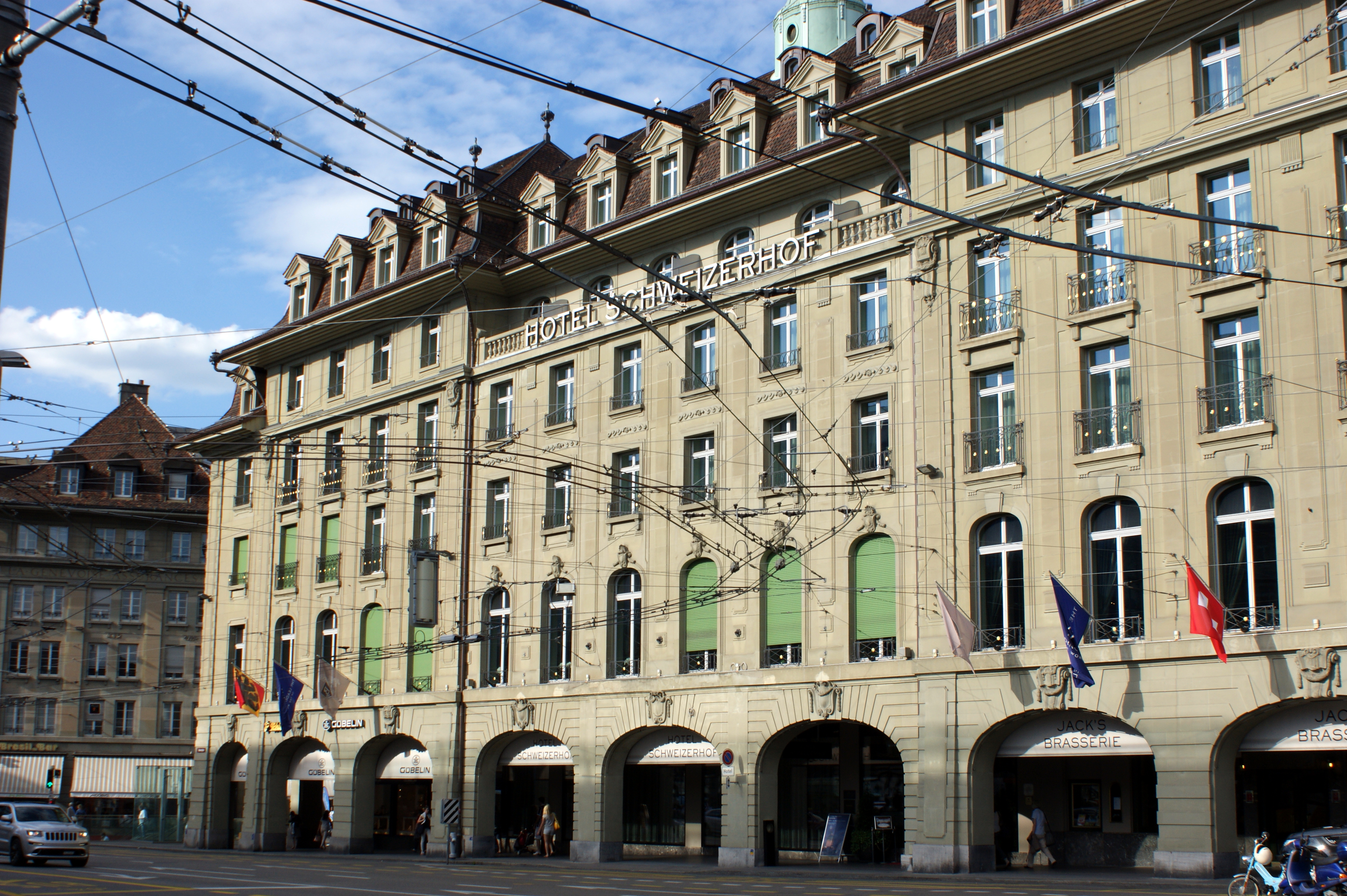 Front Hotel Schweizerhof am Bahnhofplatz in Bern, Schweiz